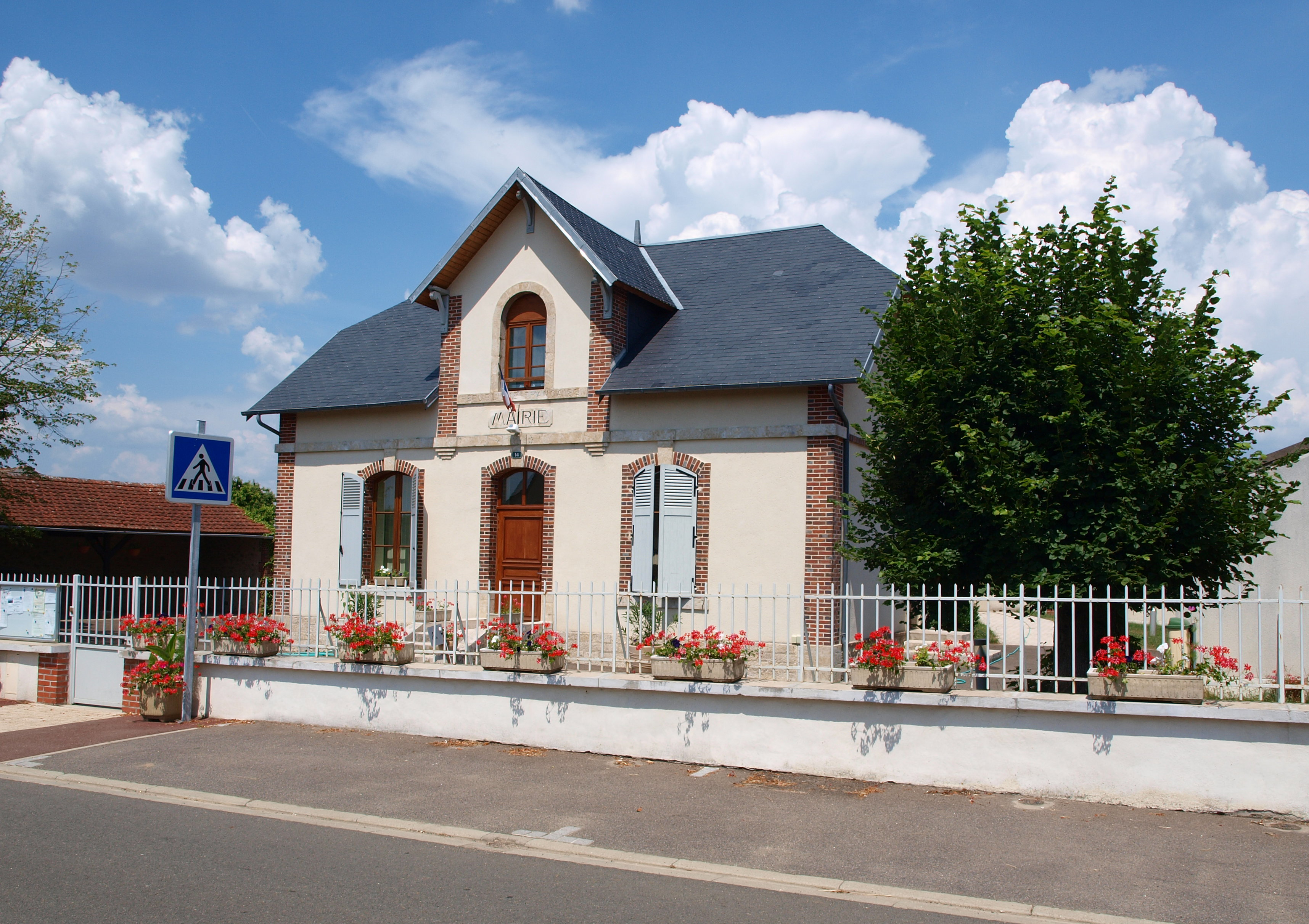 Batilly-en-Puisaye (Loiret, France) ; mairie